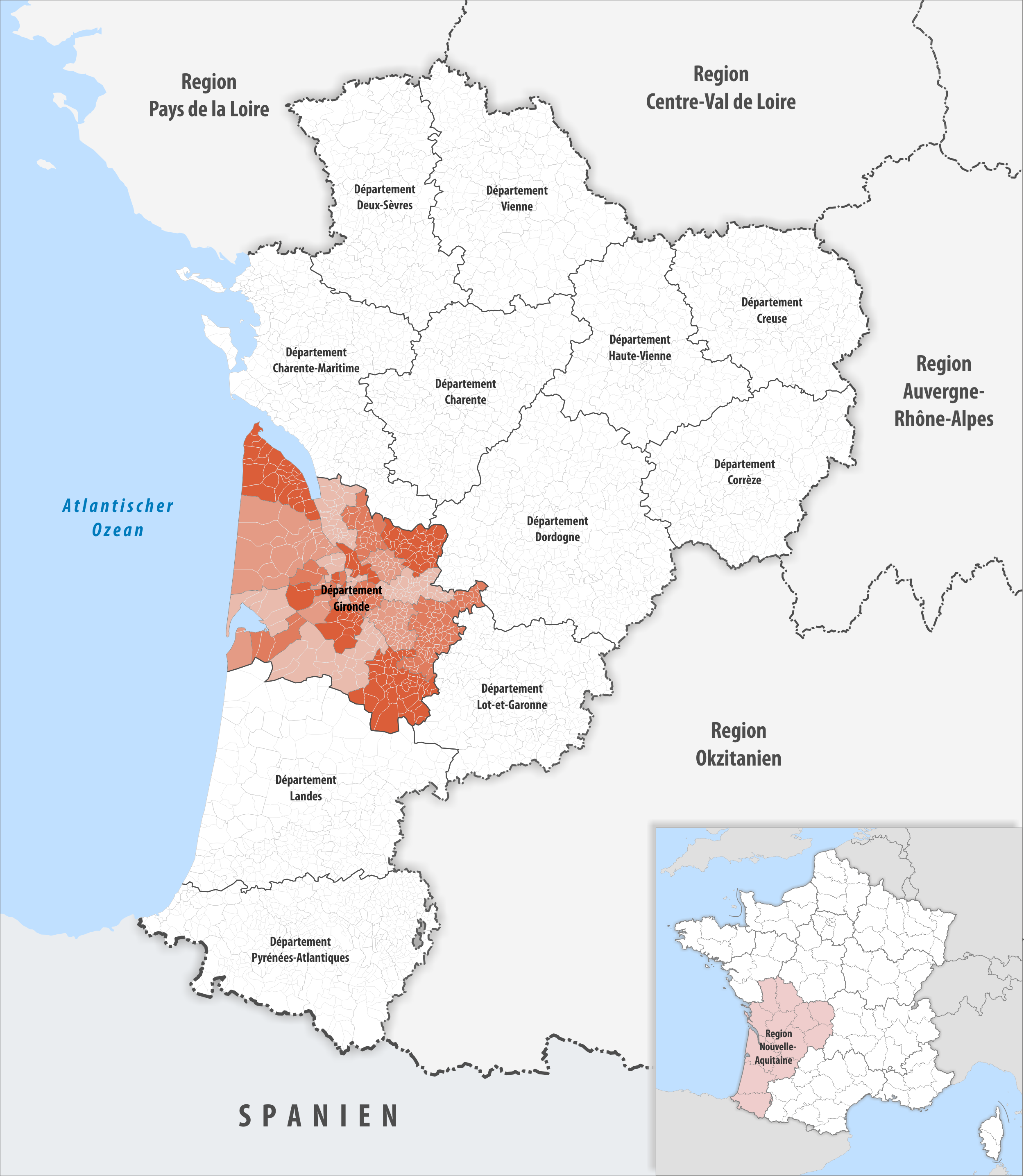 Lage des Departements Gironde